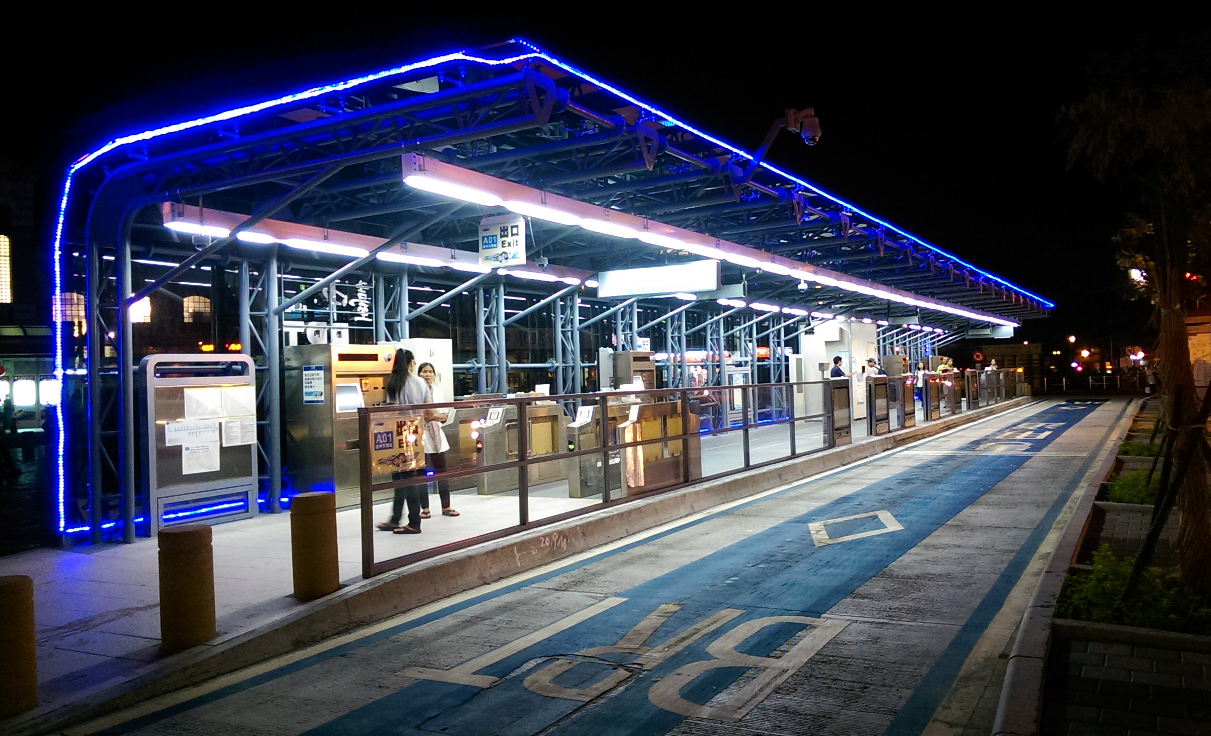 中文（台灣）: 台中BRT-臺中火車站